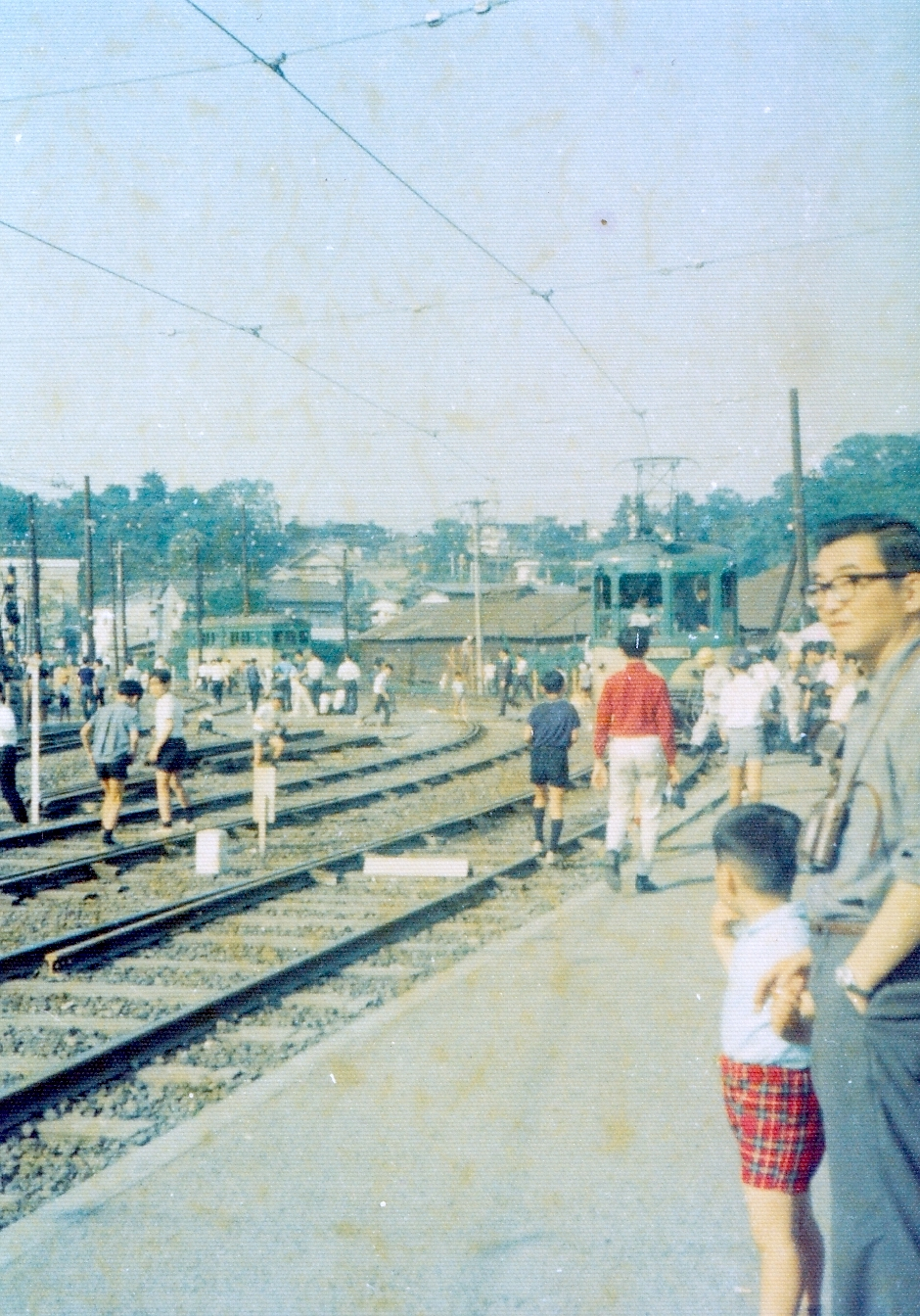 1969年頃 二子玉川駅ホームにて。なお、玉電と砧線は同1969年5月にともに廃止となっている（写真撮影者：大勝庵・玉電と郷土の歴史館 大塚勝利）。